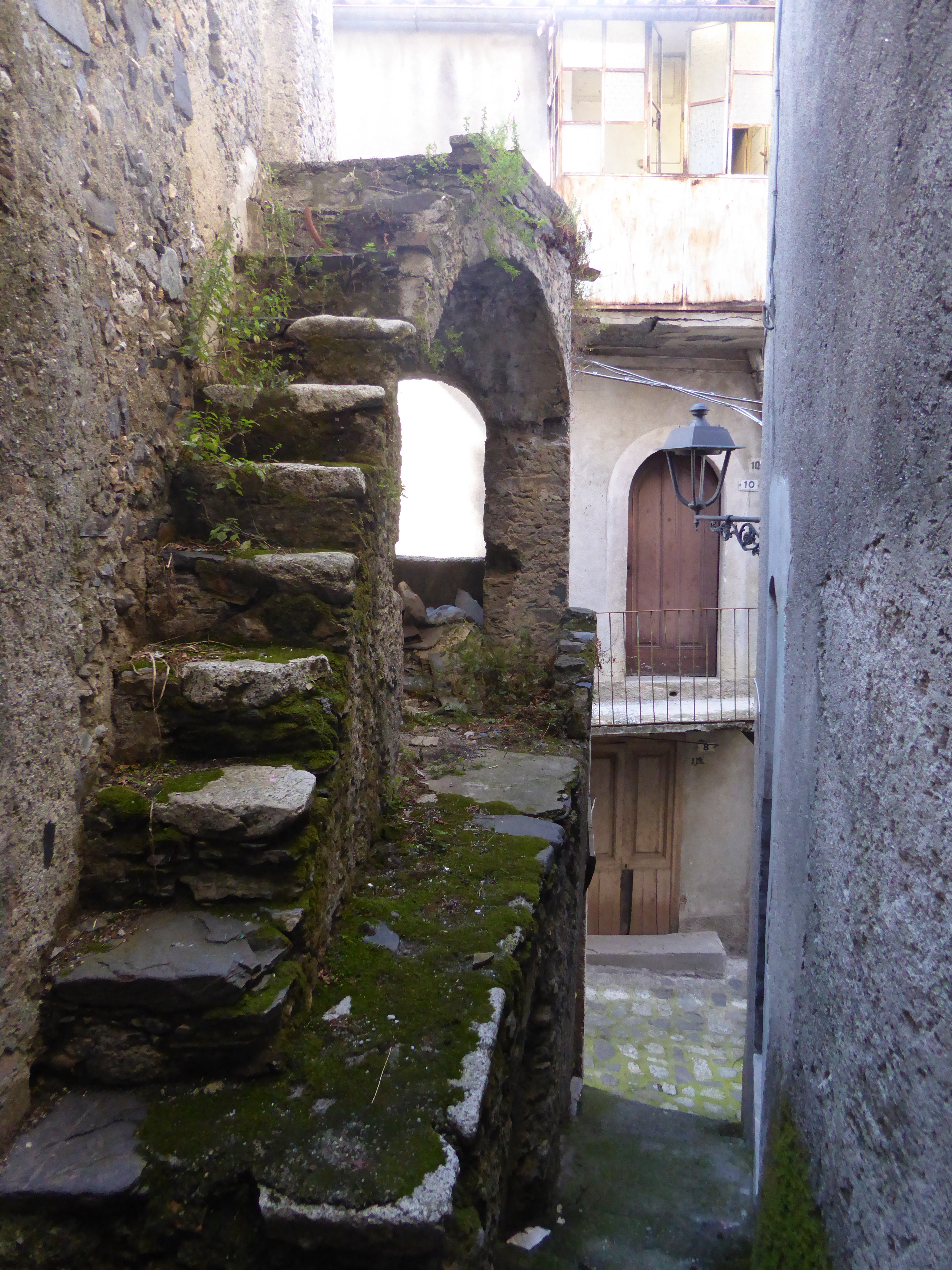 Vicolo di Bivongi (2018)